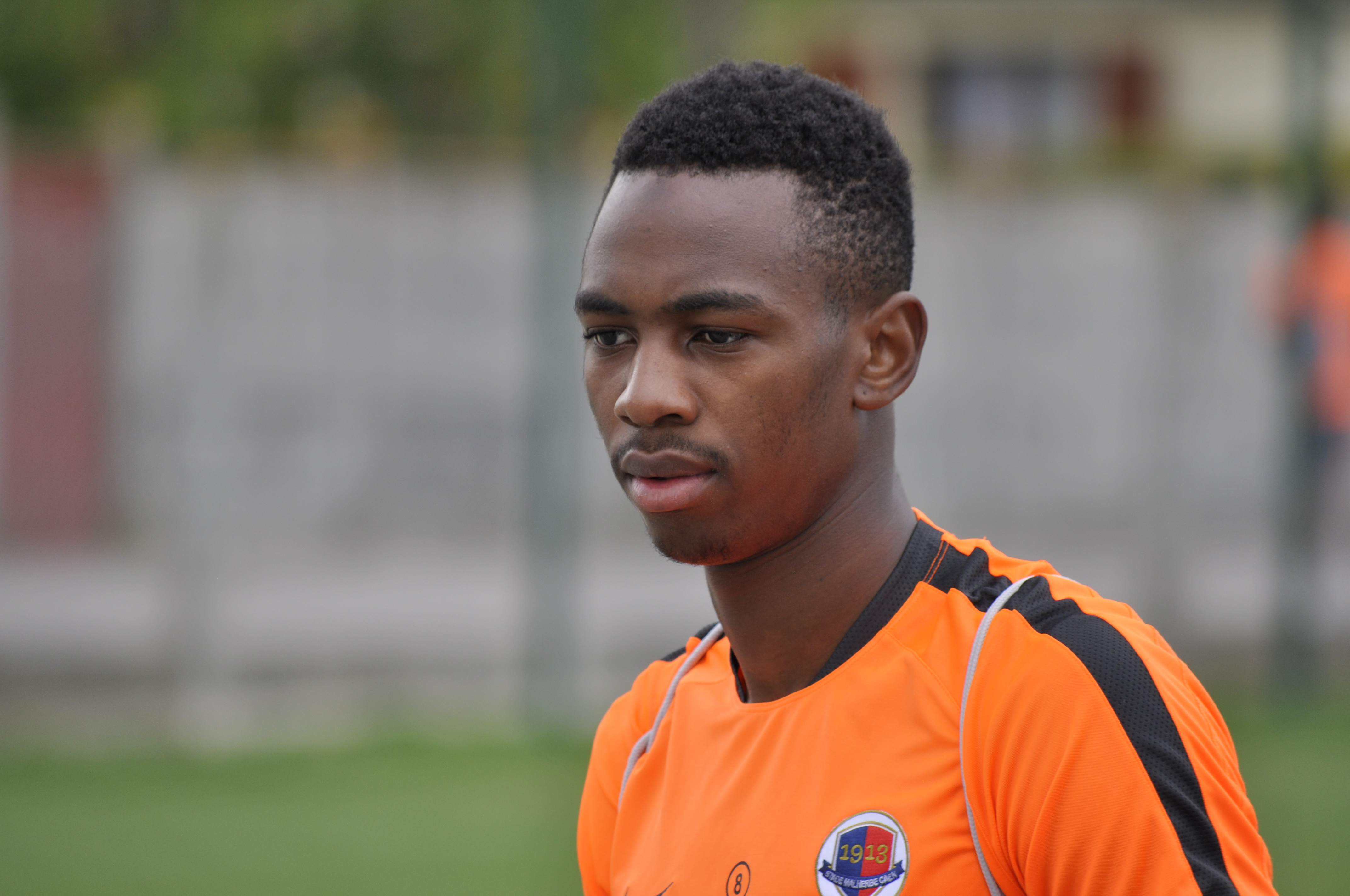 Jordan Nkololo joueur de football professionnel